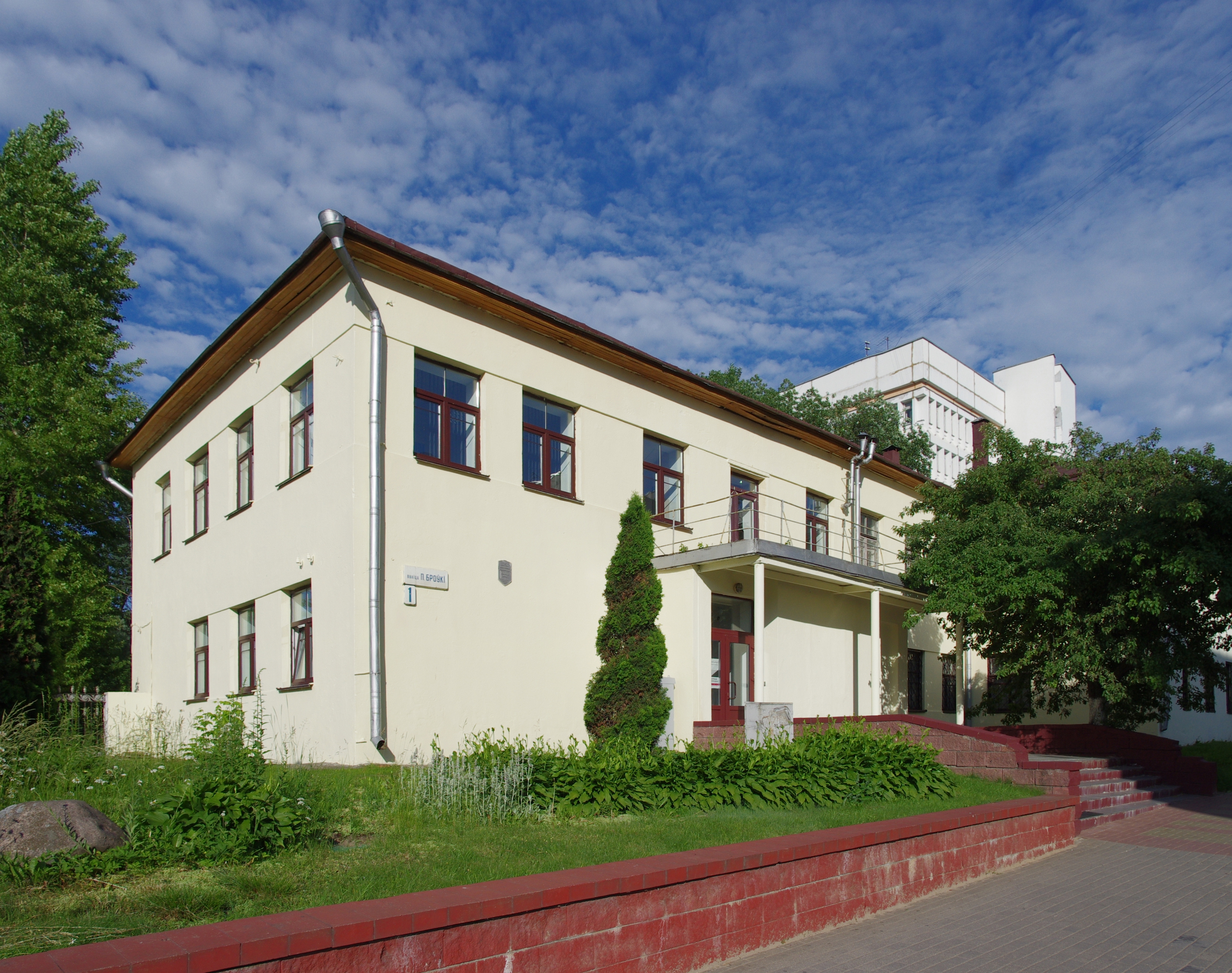 Гістарычны будынак каля бальніцы